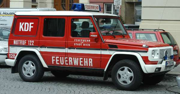 Kommandofahrzeug der Wiener Berufsfeuerwehr MA68